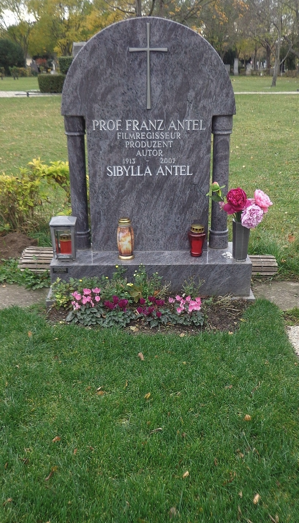 Wiener Zentralfriedhof - Gruppe 40: ehrenhalber gewidmetes Grab von Franz Antel